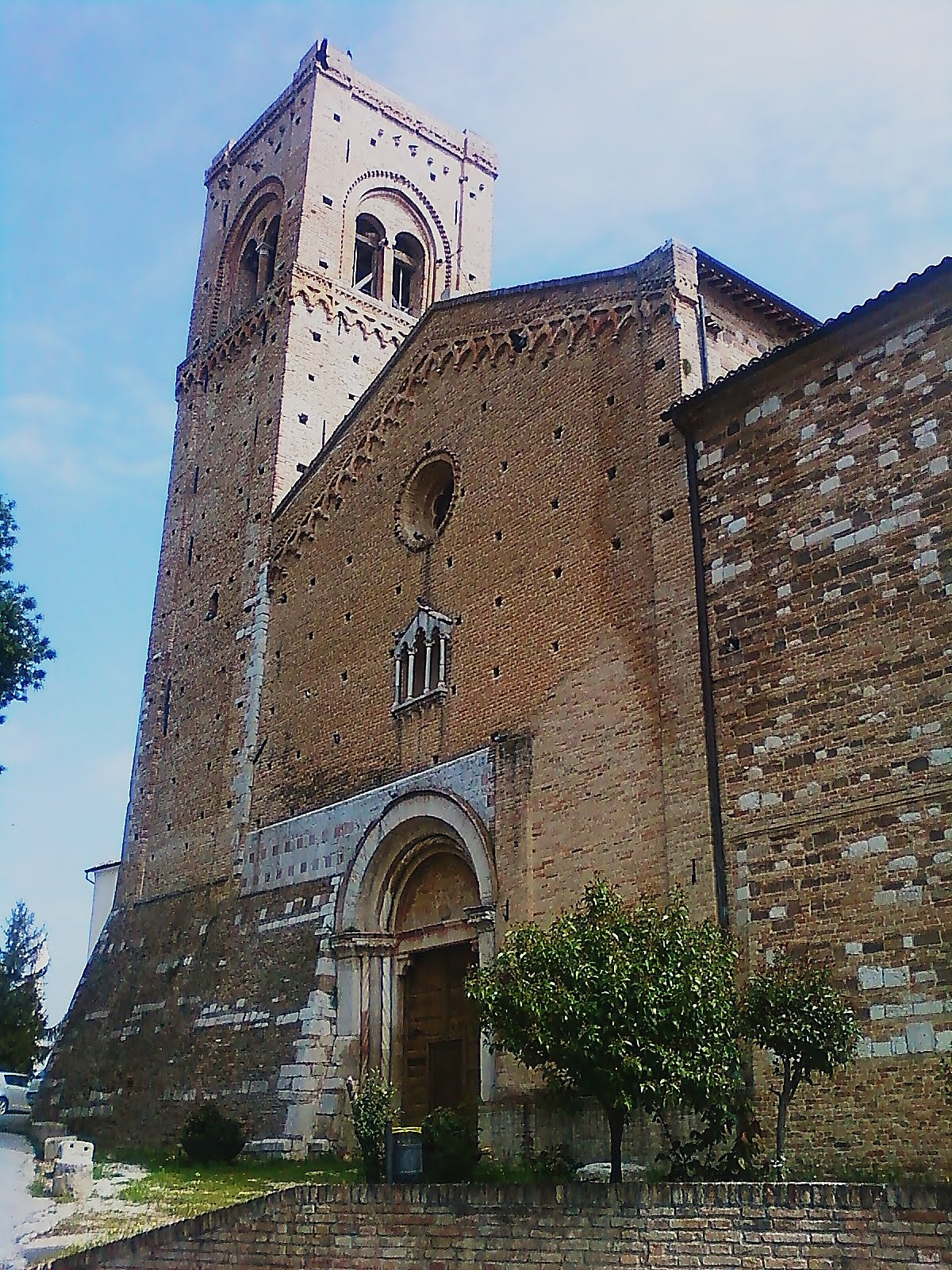 Santuario di San Severino - Duomo Antico Ingresso duomo vecchio, castello al monte This is a photo of a monument which is part of cultural heritage of Italy.